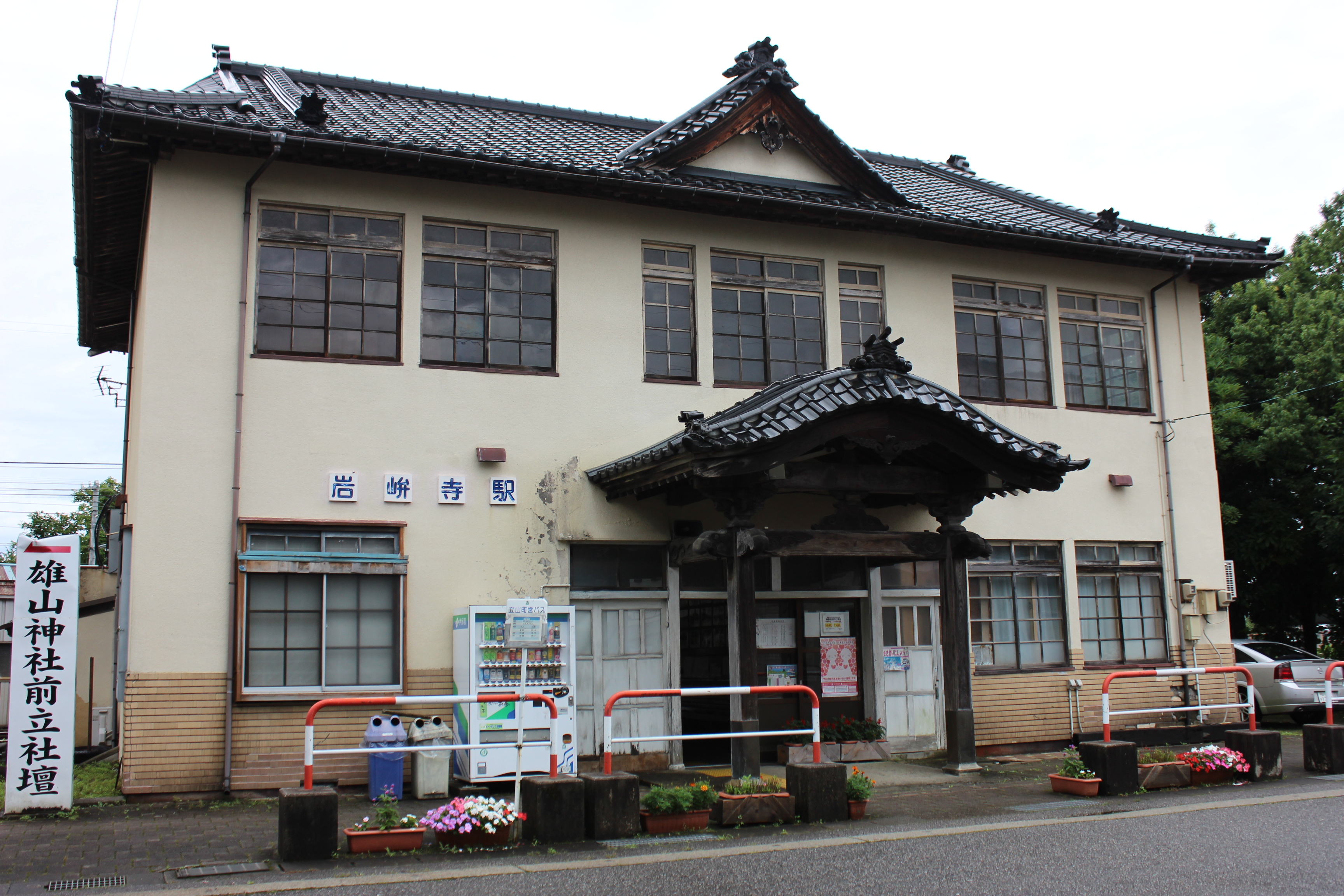 岩峅寺駅（富山県中新川郡立山町）